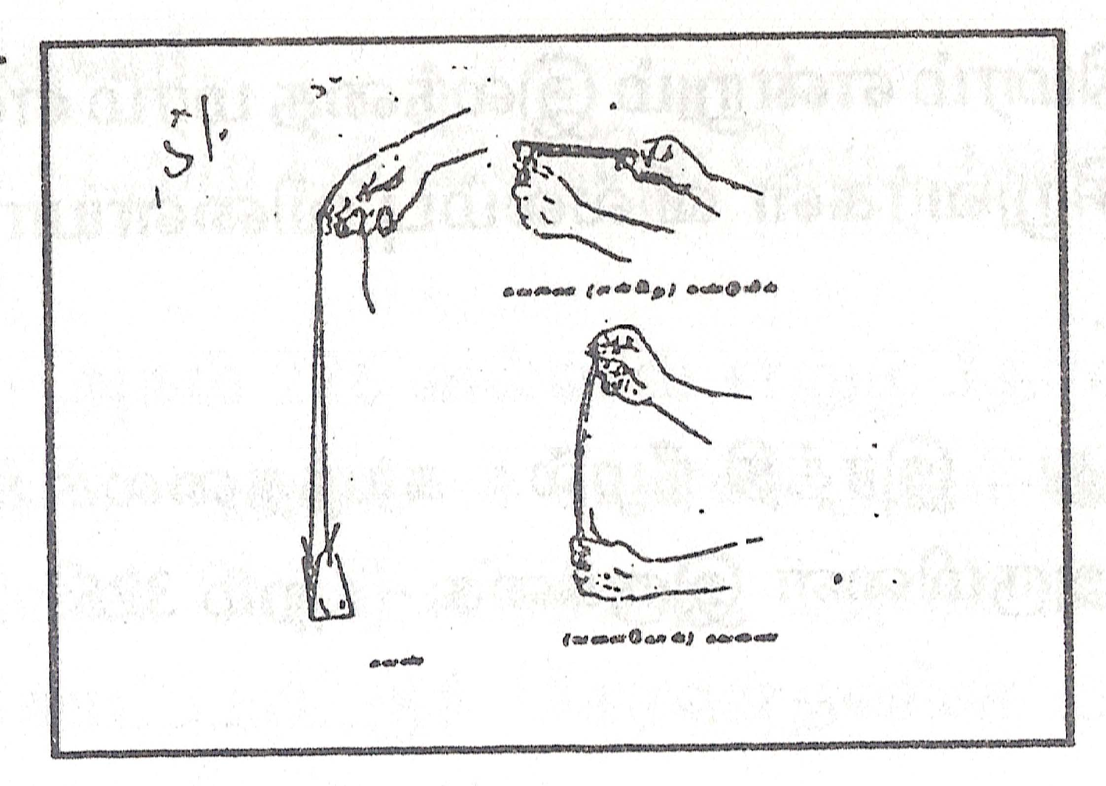 Kinds of slings used by ancient Tamils. விளையாட்டுக்கும், தொழிலுக்கும் பயன்படுத்தப்படும் கவண் கருவிகளும் கவணைக் கருவிகளும், 'பழங்கால விளையாட்டுகள்' என்னும் எனது நூலிலிருந்து எடுத்துப் பதிவேற்றப்பட்டுள்ளது.